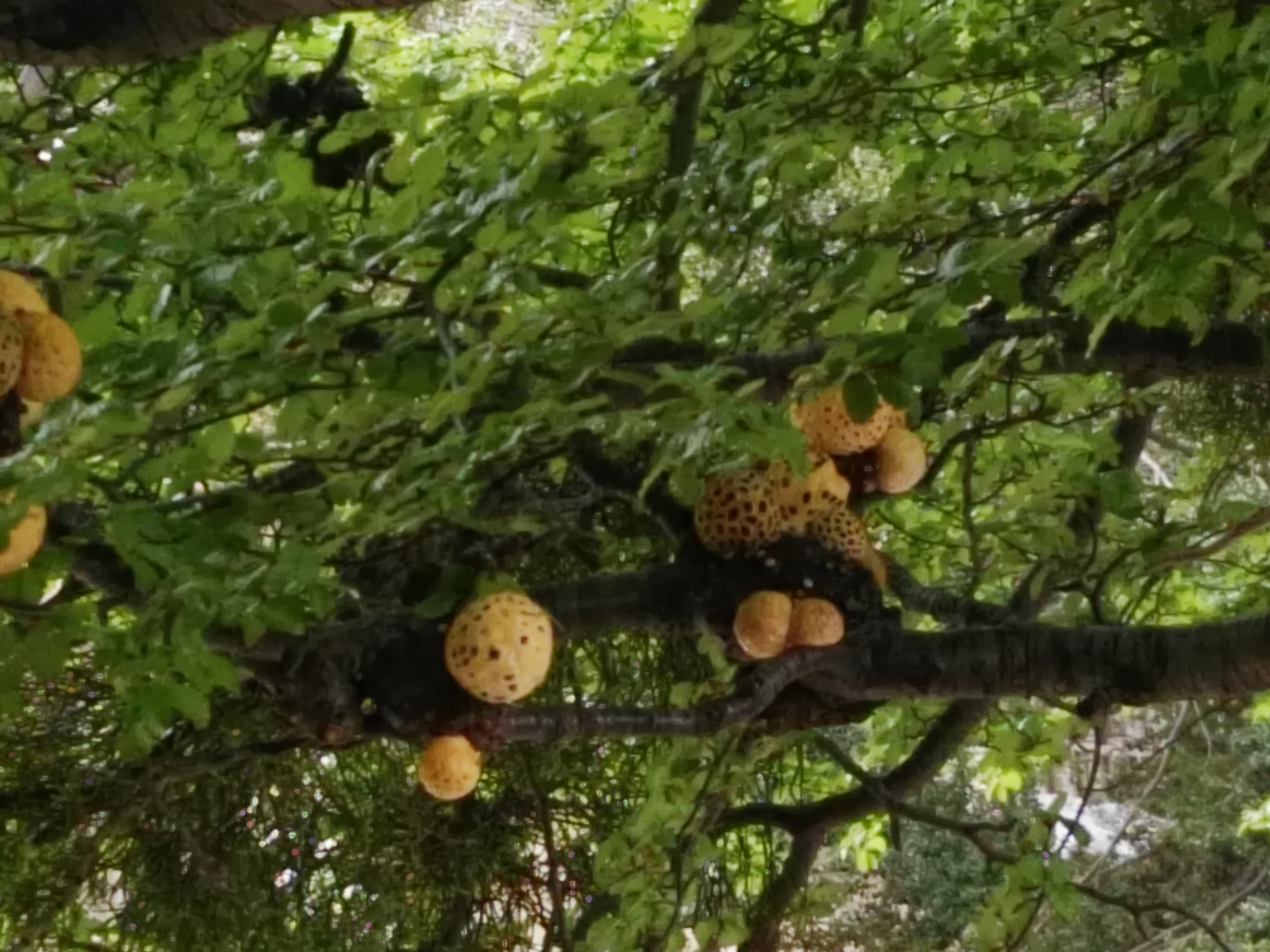 Hongo comestible del bosque, Tierra del Fuego.